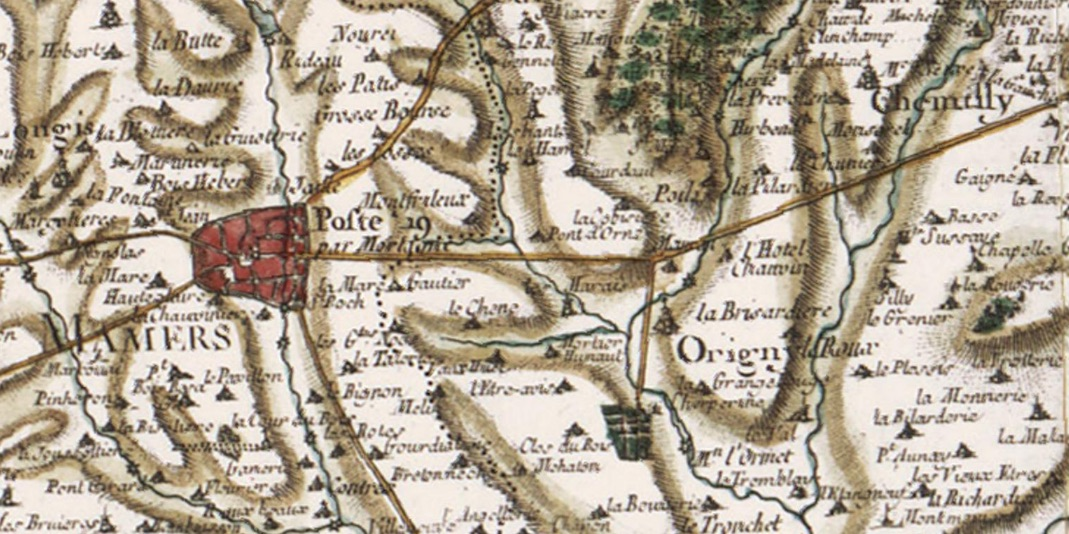 Extrait de la carte de Cassini centrée sur Origny-le-Roux et le château de Chèreperrine ( actuel département de l'Orne)